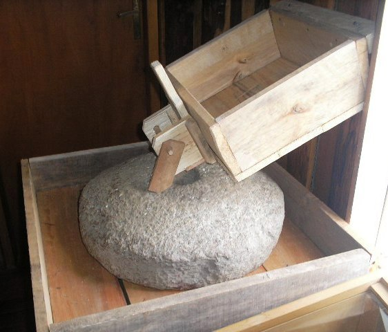 Parte superior de un molino chilote en el Museo de Dalcahue, Chiloé, Chile.